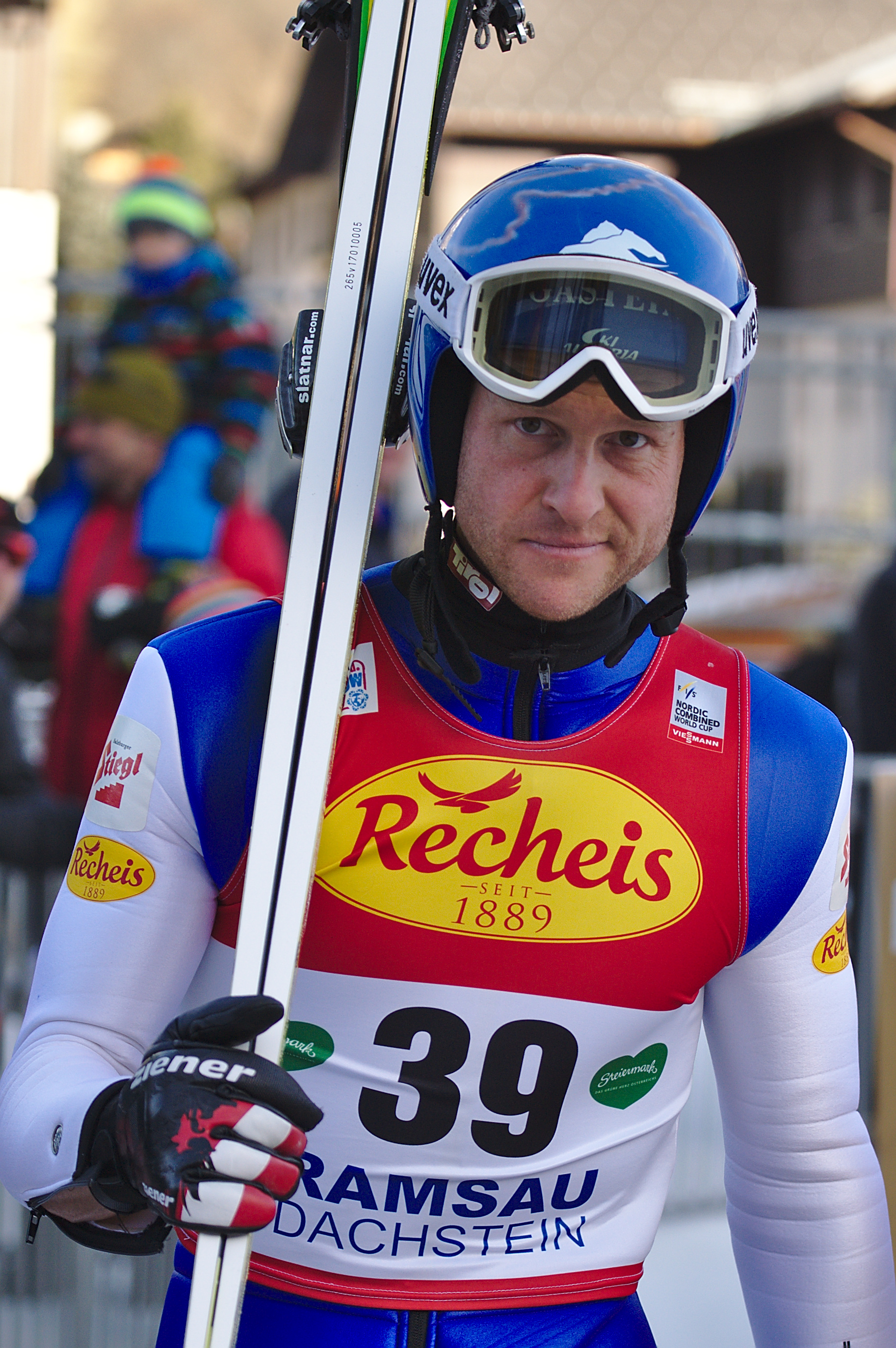 FIS Worldcup Nordic Combined Ramsau 2016. Bild zeigt Bernhard Gruber (AUT)